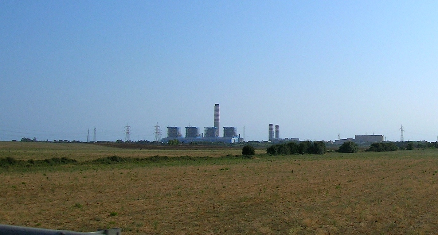 Centrale termoelettrica Alessandro Volta, Montalto di Castro (VT), Italia.